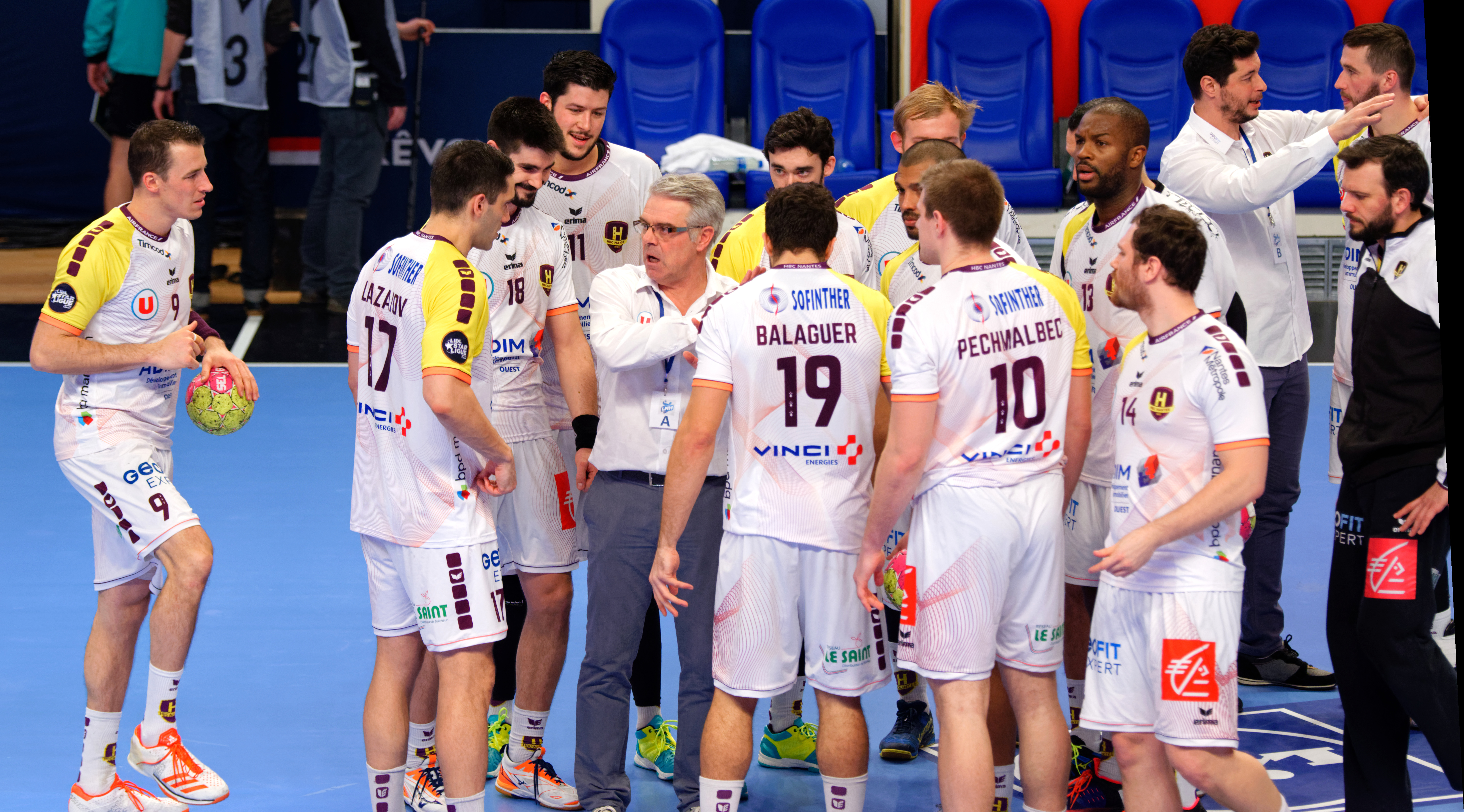 Quart de finale de la Coupe de la Ligue entre le PSG et le HBC Nantes. A Coubertin, le 14 décembre 2017.